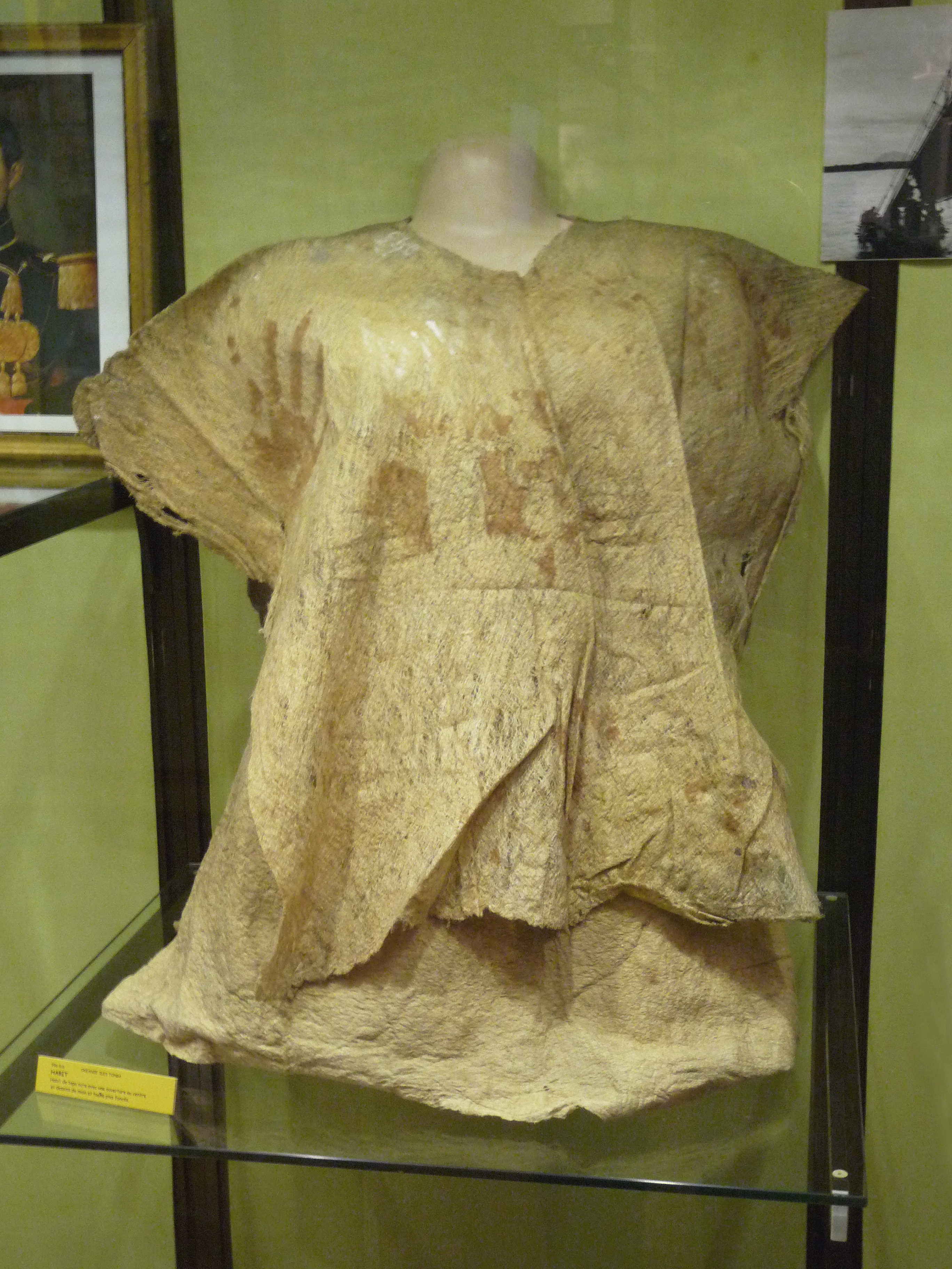 Iles Tonga : habit de tapa ocre, avec une ouverture au centre et des dessins de amins et une tache plus foncée au centre. Musée d'histoire naturelle et d'ethnographie de Colmar